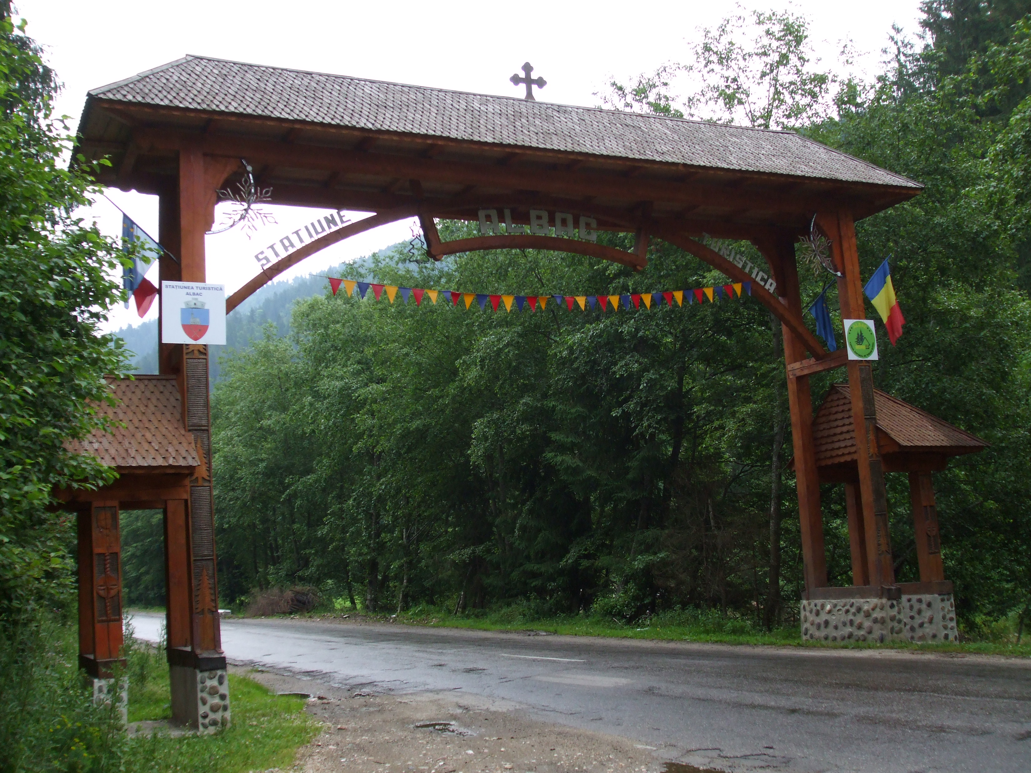 Einfahrt der Ortschaft Albac, Kreis Alba, Rumänien.